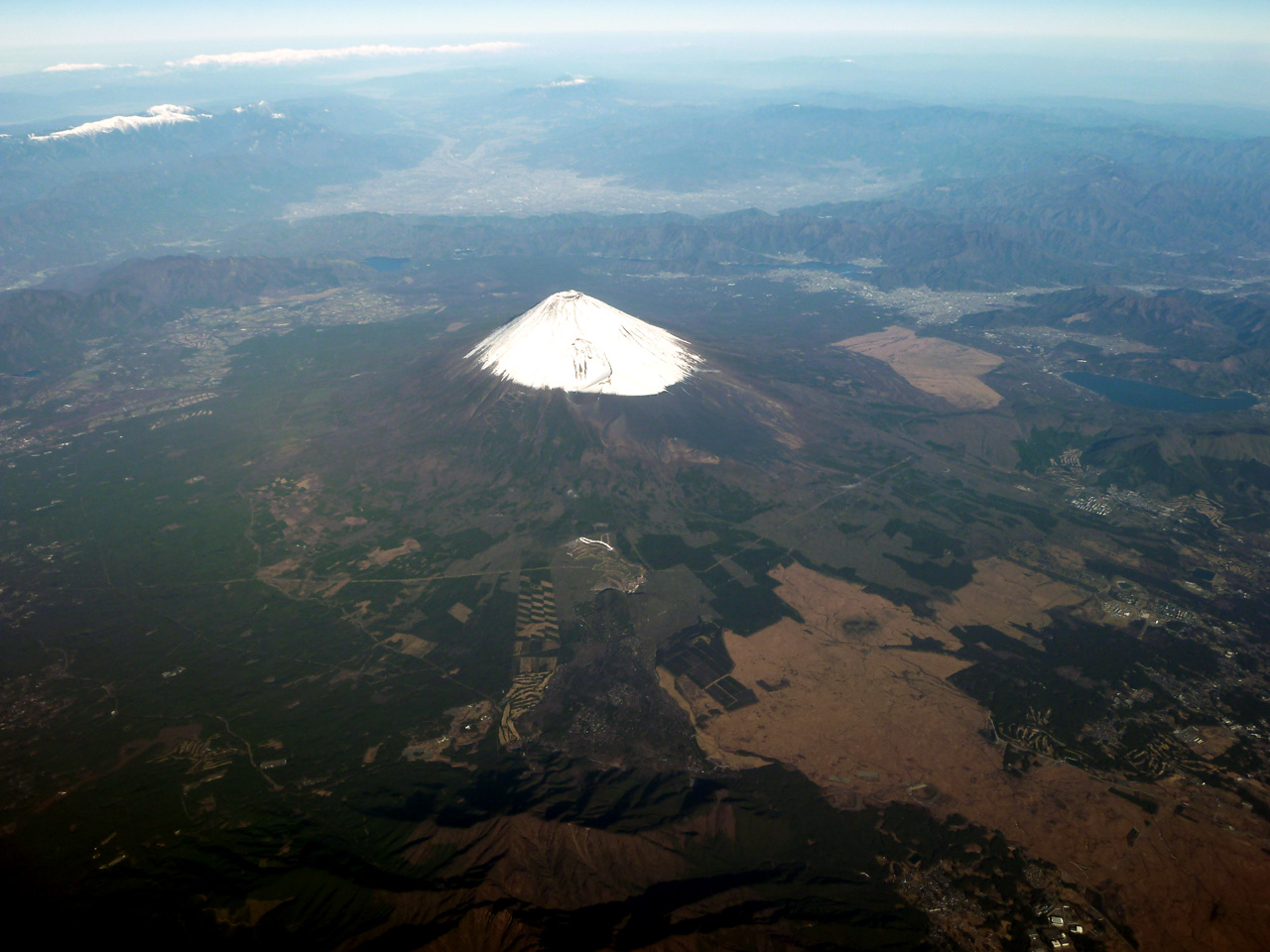 富士山と富士五湖、甲府盆地、南アルプス、北アルプス、八ヶ岳などを空撮。手前の山は開析が進む愛鷹山（あしたかやま）。